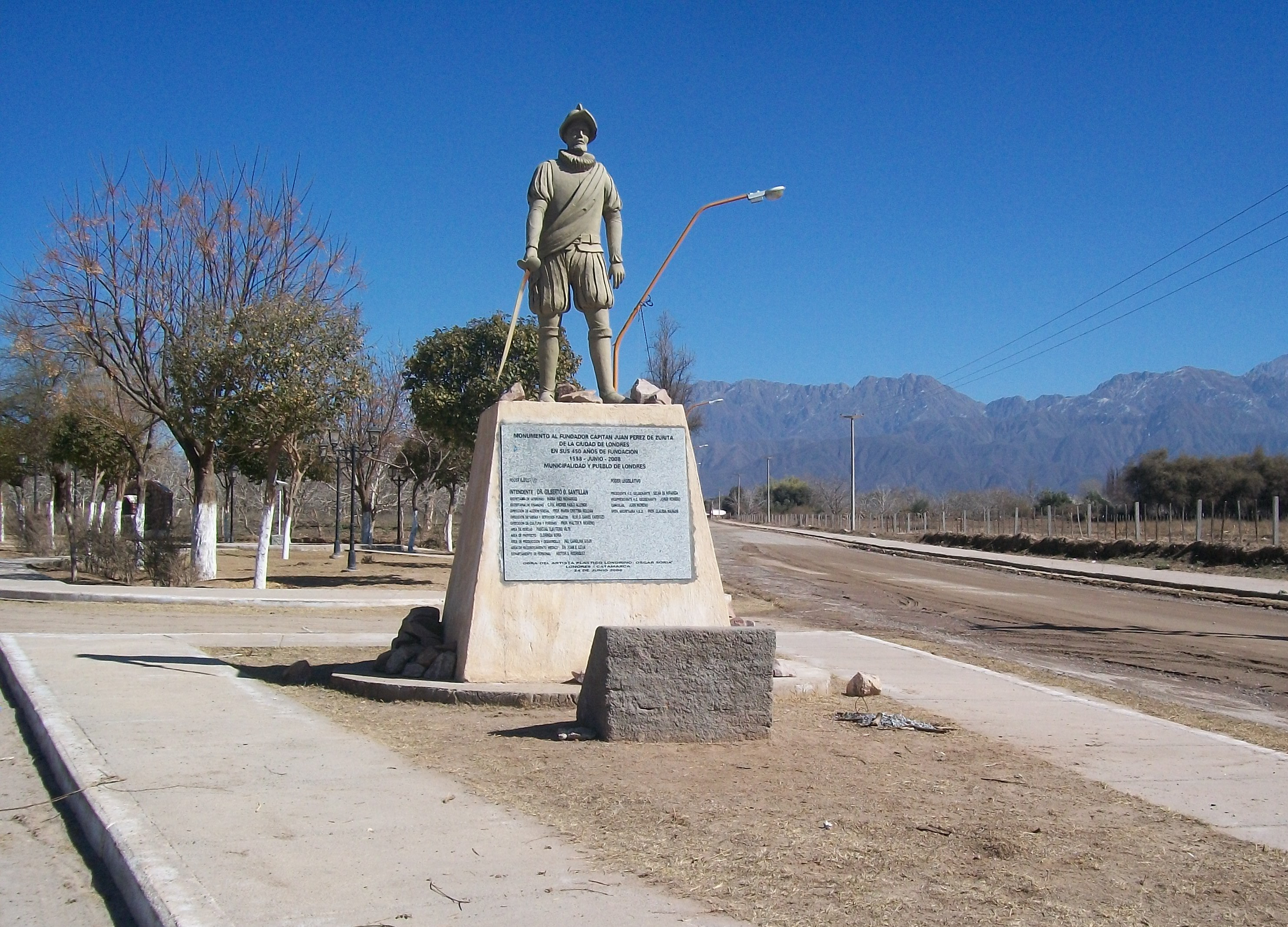 Monumento a Juan Perz de Zurita a 450 años de la fundación de la ciudad de Londres en la actual provincia de Catamarca, Argentina.